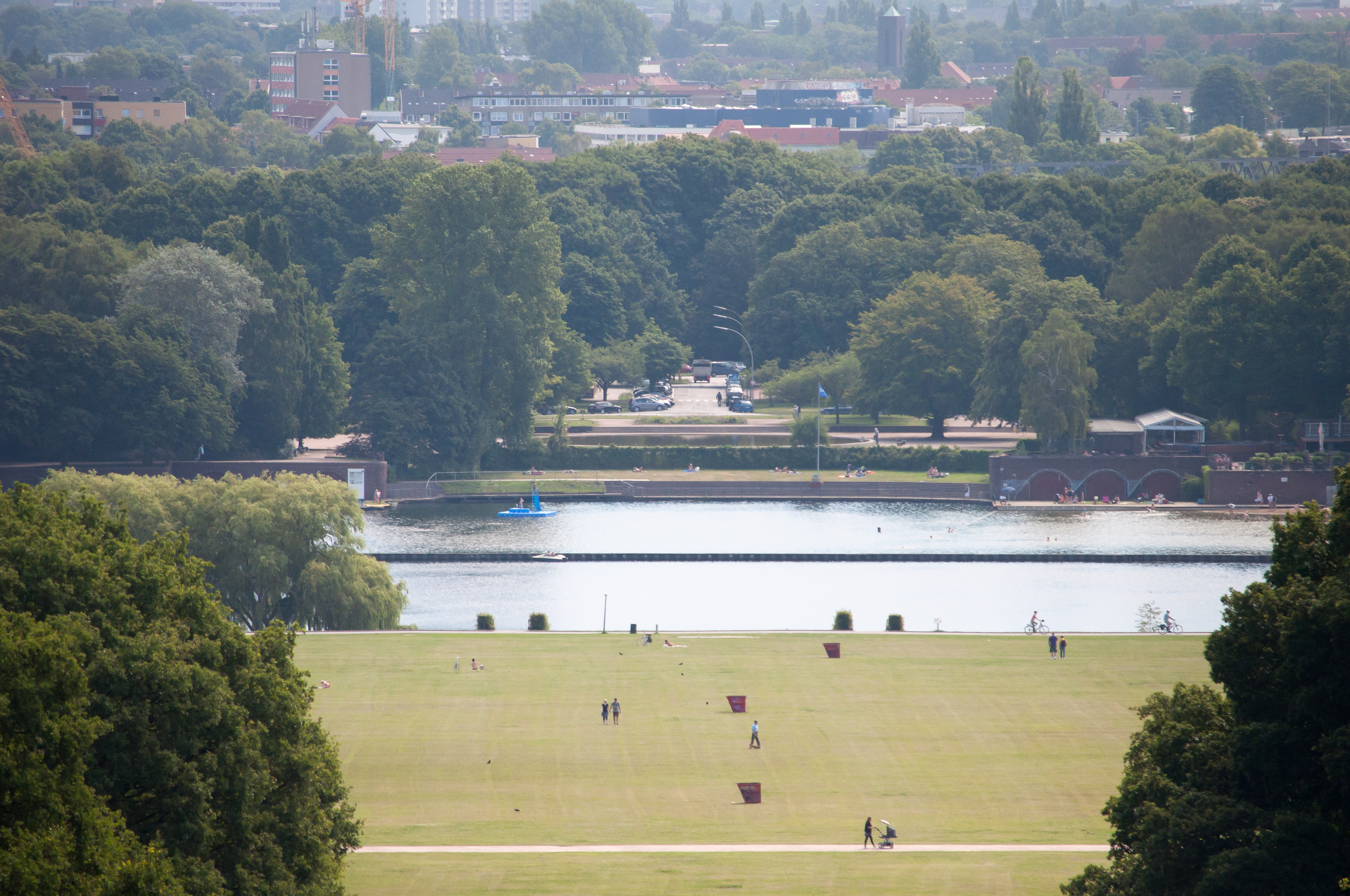 Blick vom Planetarium auf den Stadtparksee in Hamburg-Winterhude. This is a photograph of an architectural monument.